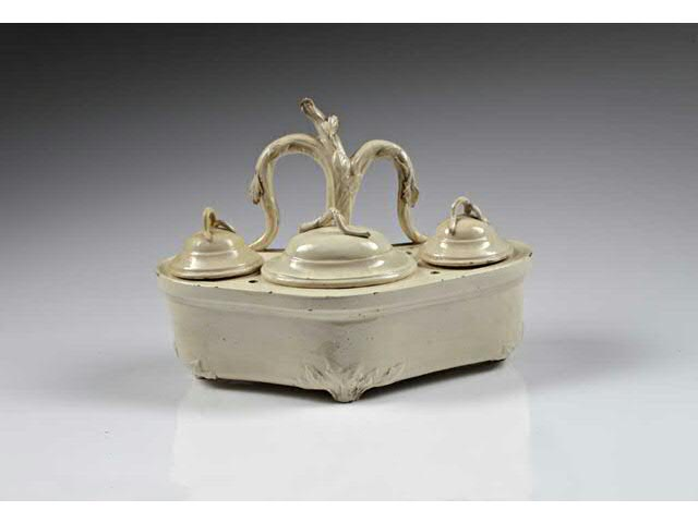 Ecritoire en faïence, manufacture de Pont aux choux encrier XVIIIe siècle, France